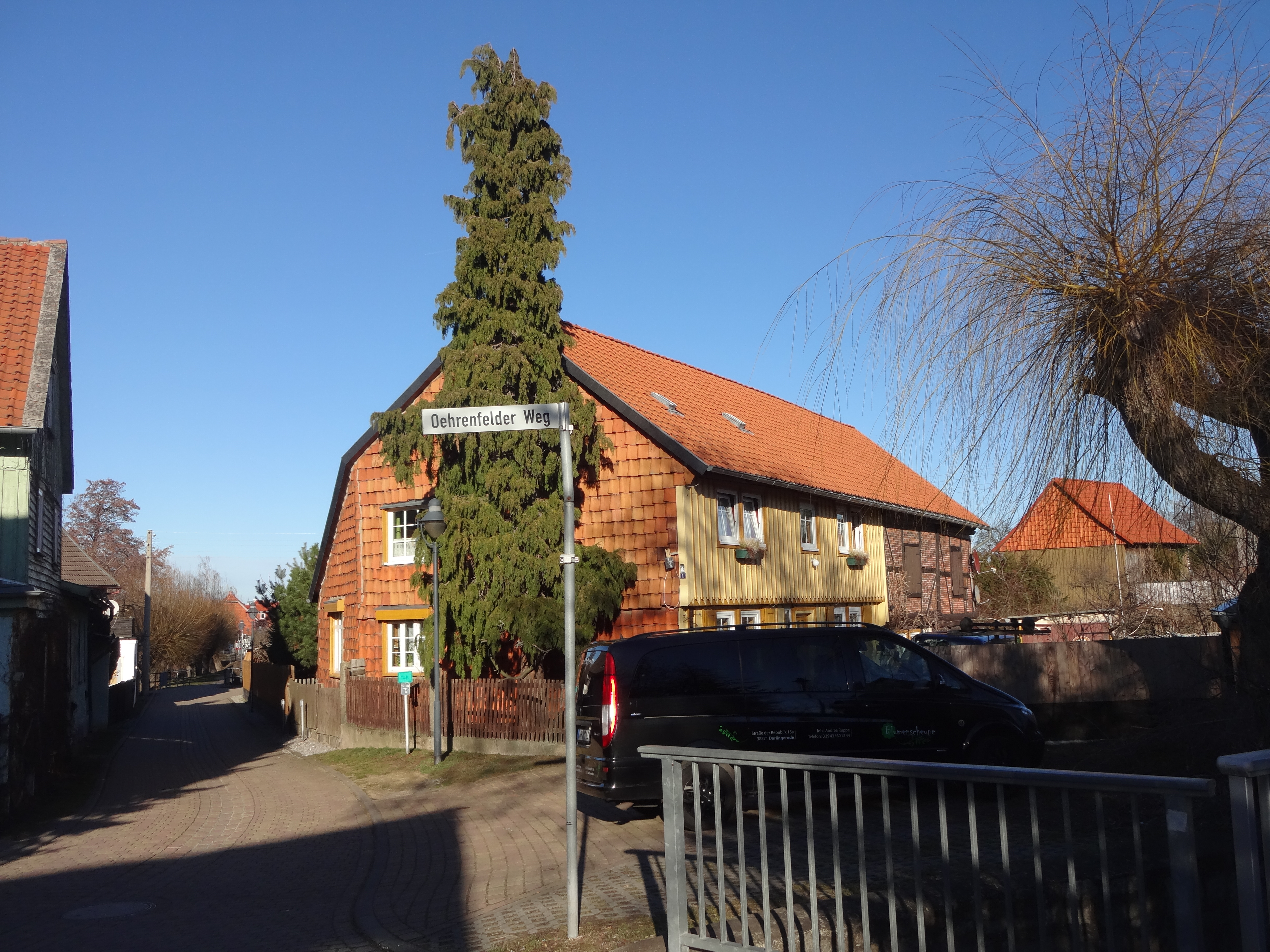 denkmalgeschützter Bauernhof im Oehrenfelder Weg 1 in Darlingerode